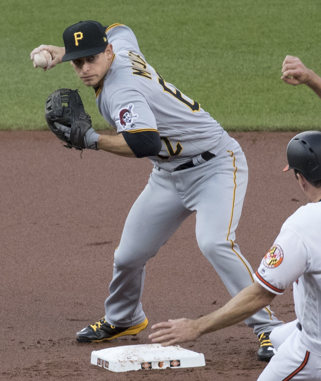 Pirates at Orioles 6/7/17